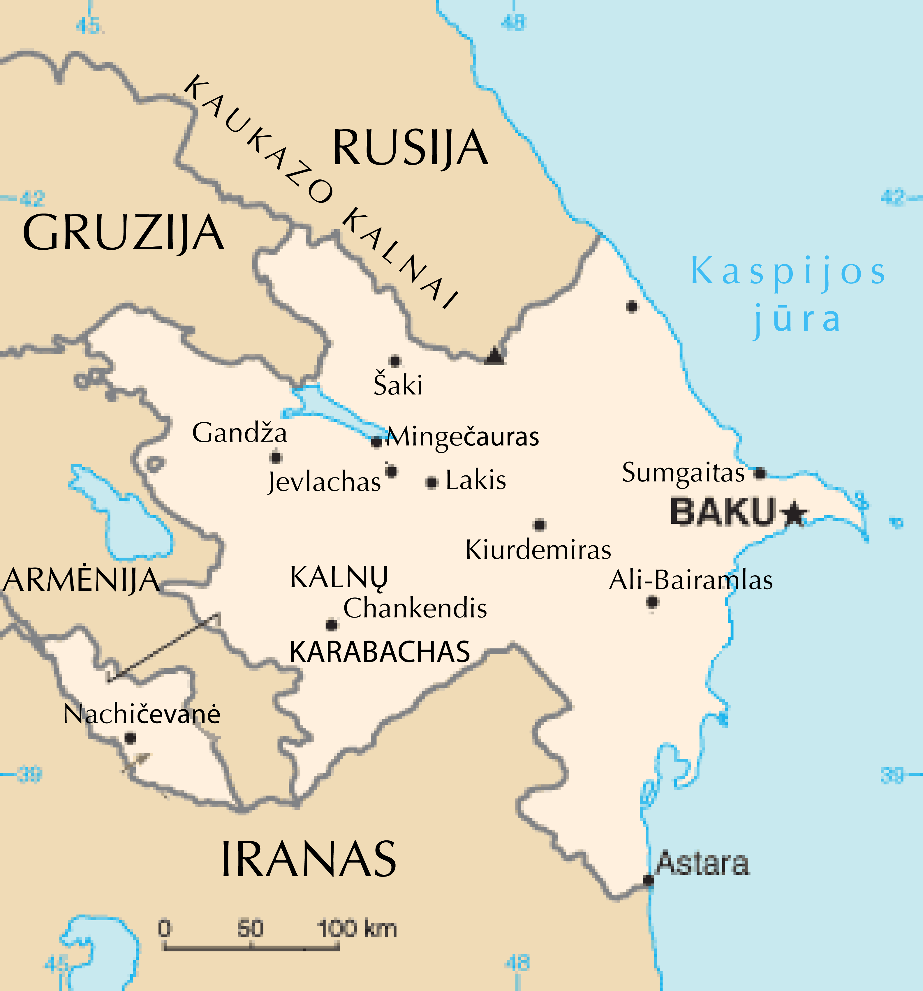 Cia map of Azerbaijan